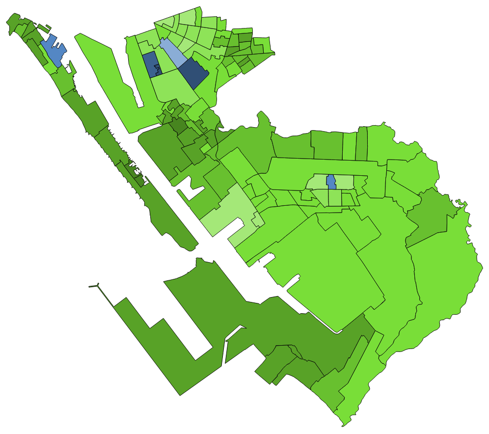 中文（台灣）: 顏色對照表